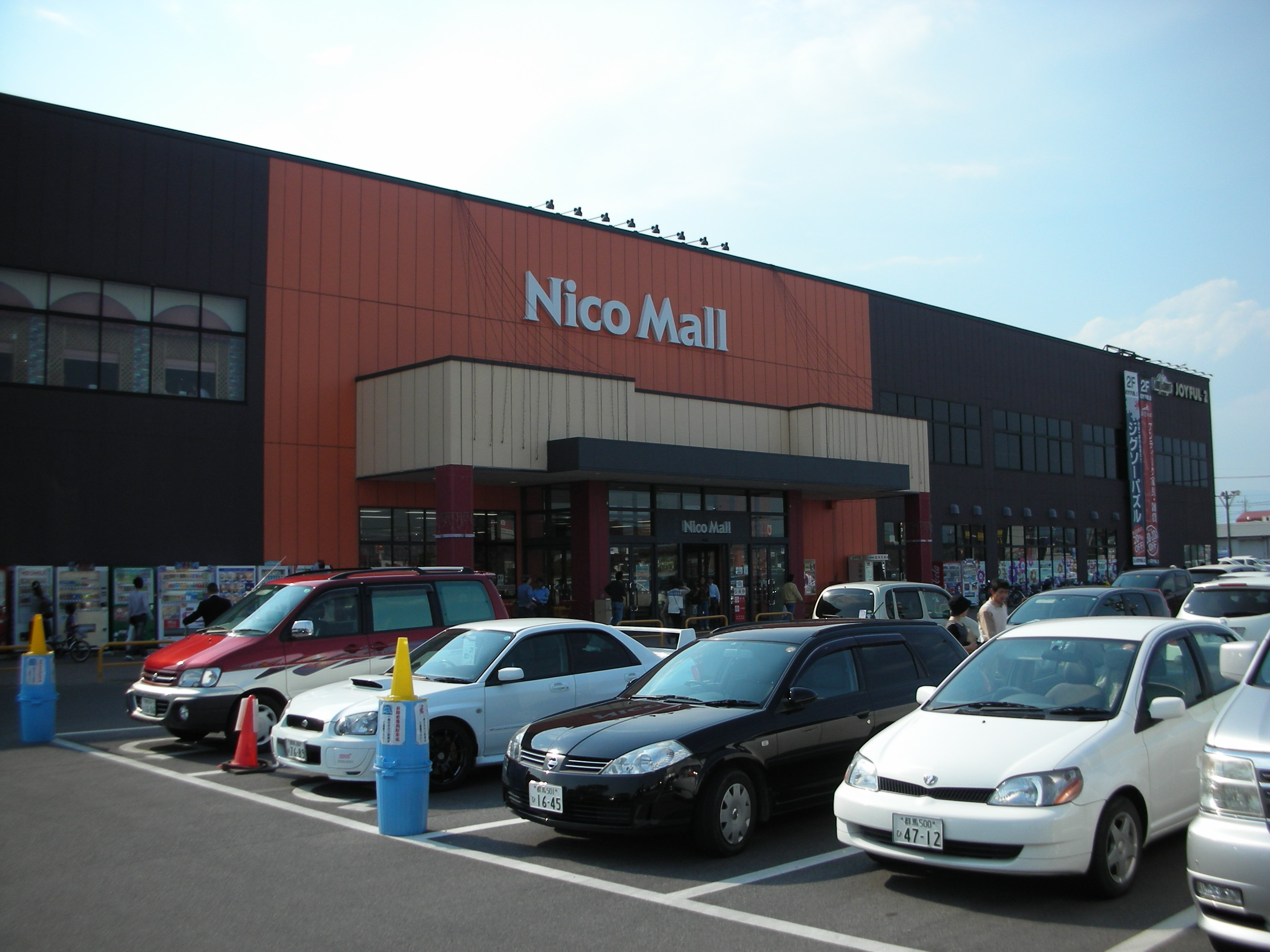 ニコモール新田の外観